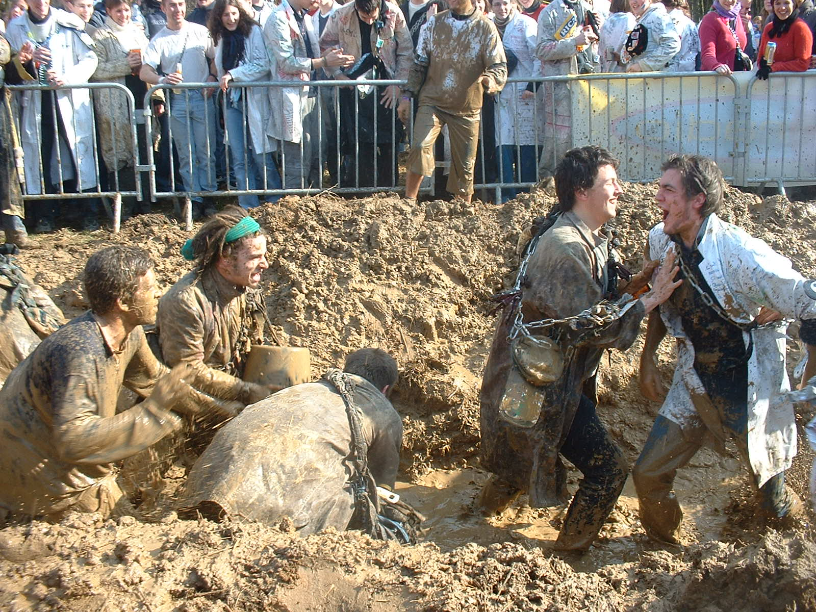 Concurrents aux 4 heures trotinettes de la Saint-Torè